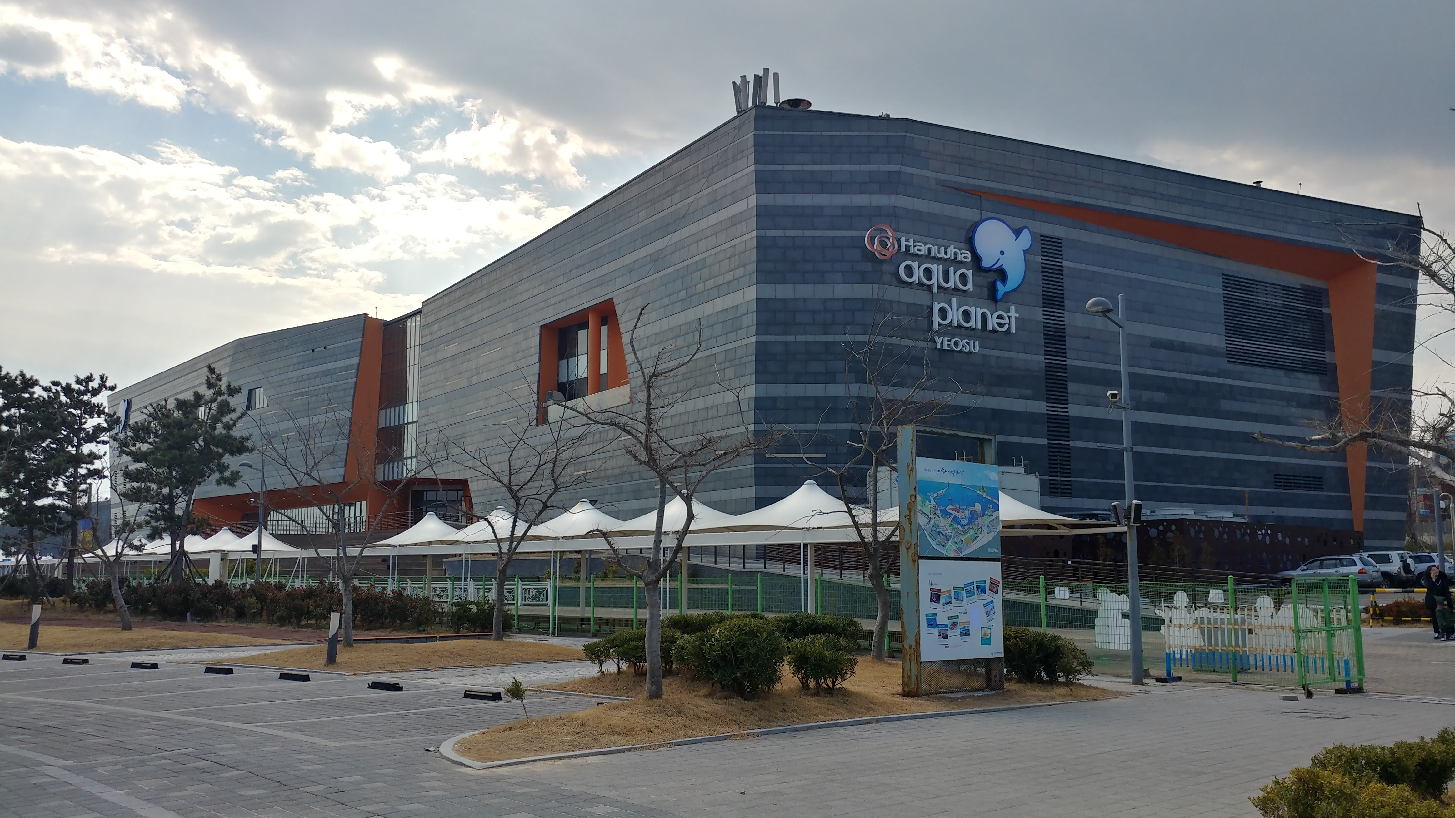 여수 한화 아쿠아플래닛